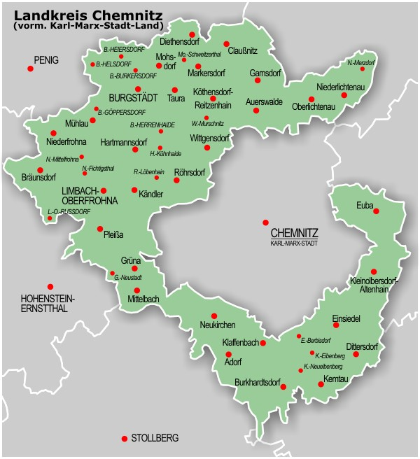 Grafik des Landkreises Chemnitz (1952–94)